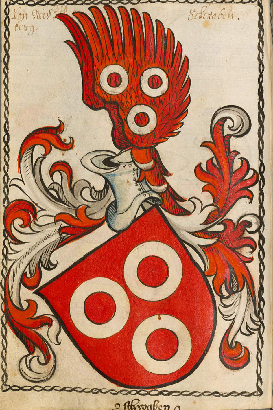 Scheibler'sches Wappenbuch , älterer Teil Schwaben Neipperg